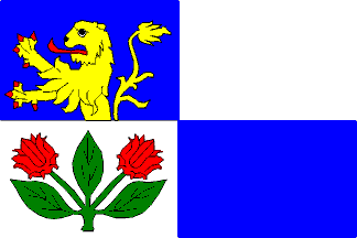 Vlajka obce Bukovina u Čisté